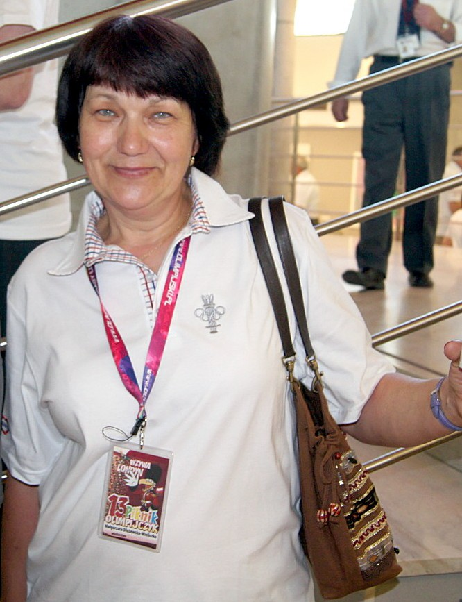 Małgorzata Dłużewska, polish Rower.